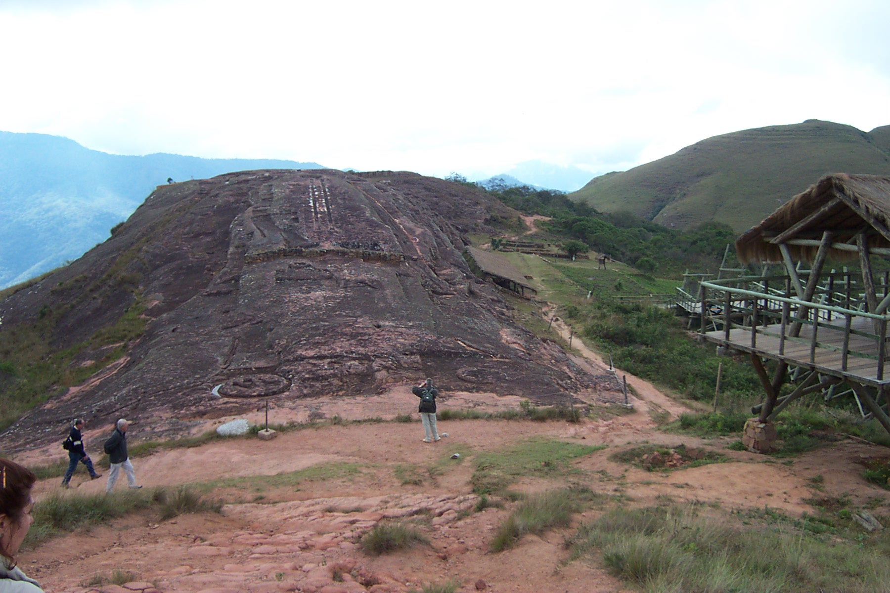 Eigen foto. Figuren en "kanalen" met religieuze(?) betekenis op de monoliet van El Fuerte de Samaipata. Zomer 2002